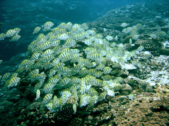 Banc de Chirurgiens bagnard (Acanthurus triostegus) (Ile de la Réunion) (Photo personnelle)